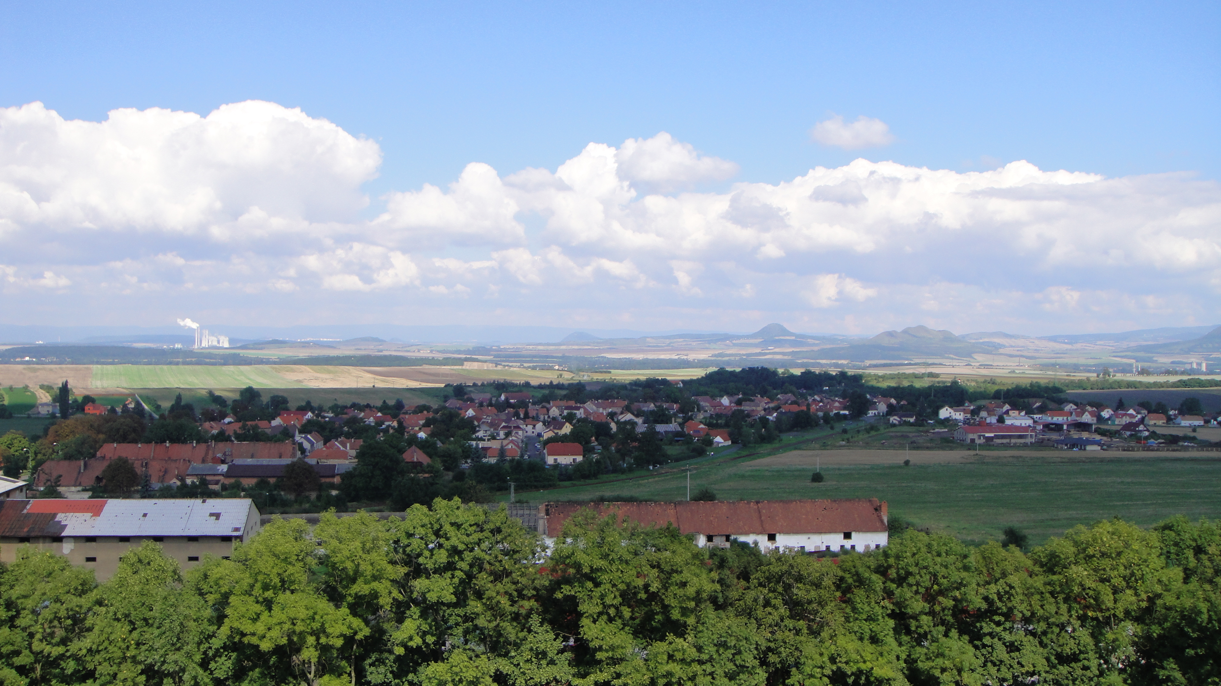 Pohled na obec Jimlín a její část Zeměchy.